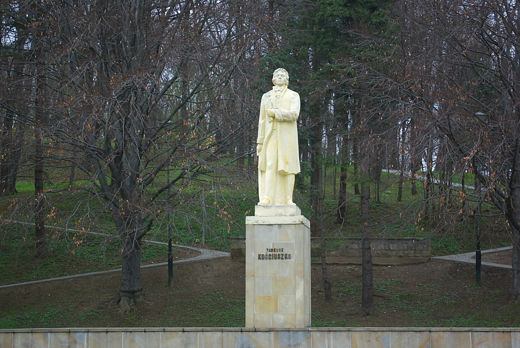 Pomnik Tadeusza Kościuszki w Sanoku